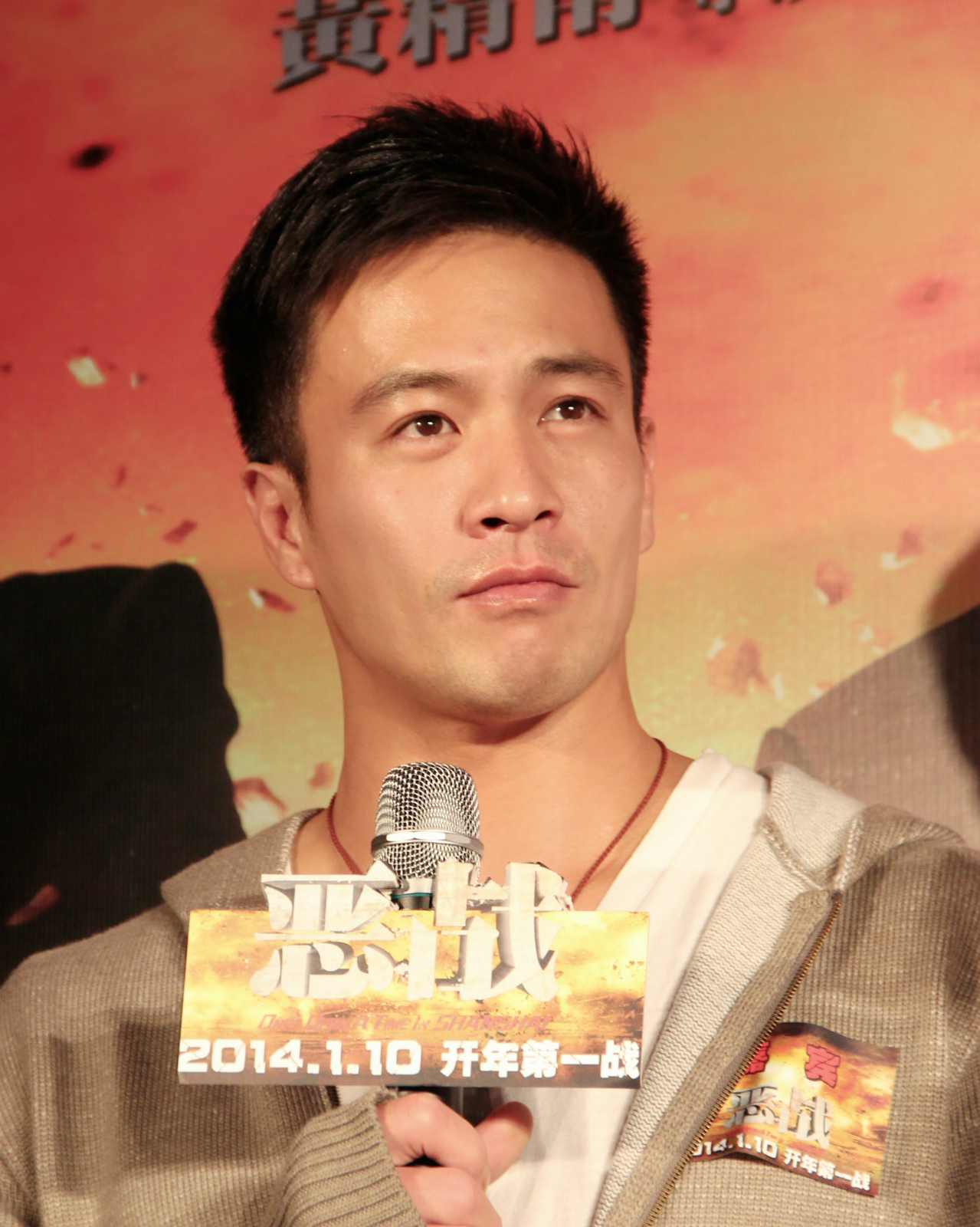 中文（中国大陆）: 電影《惡戰》首映禮